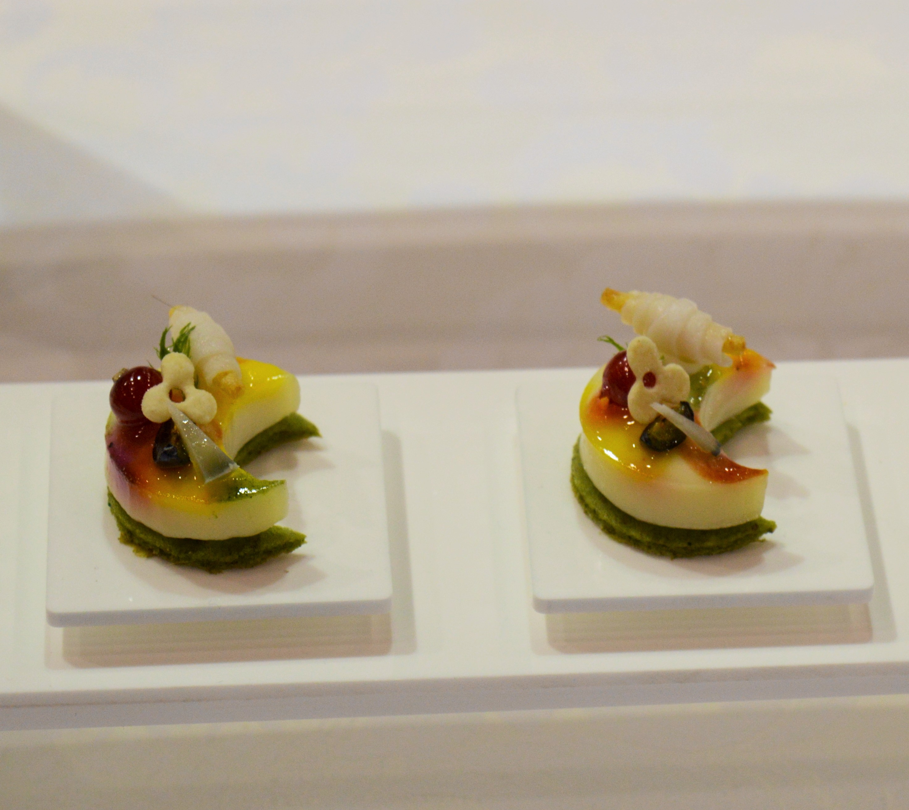 Finger Food fabio mancuso Mousse di formaggio